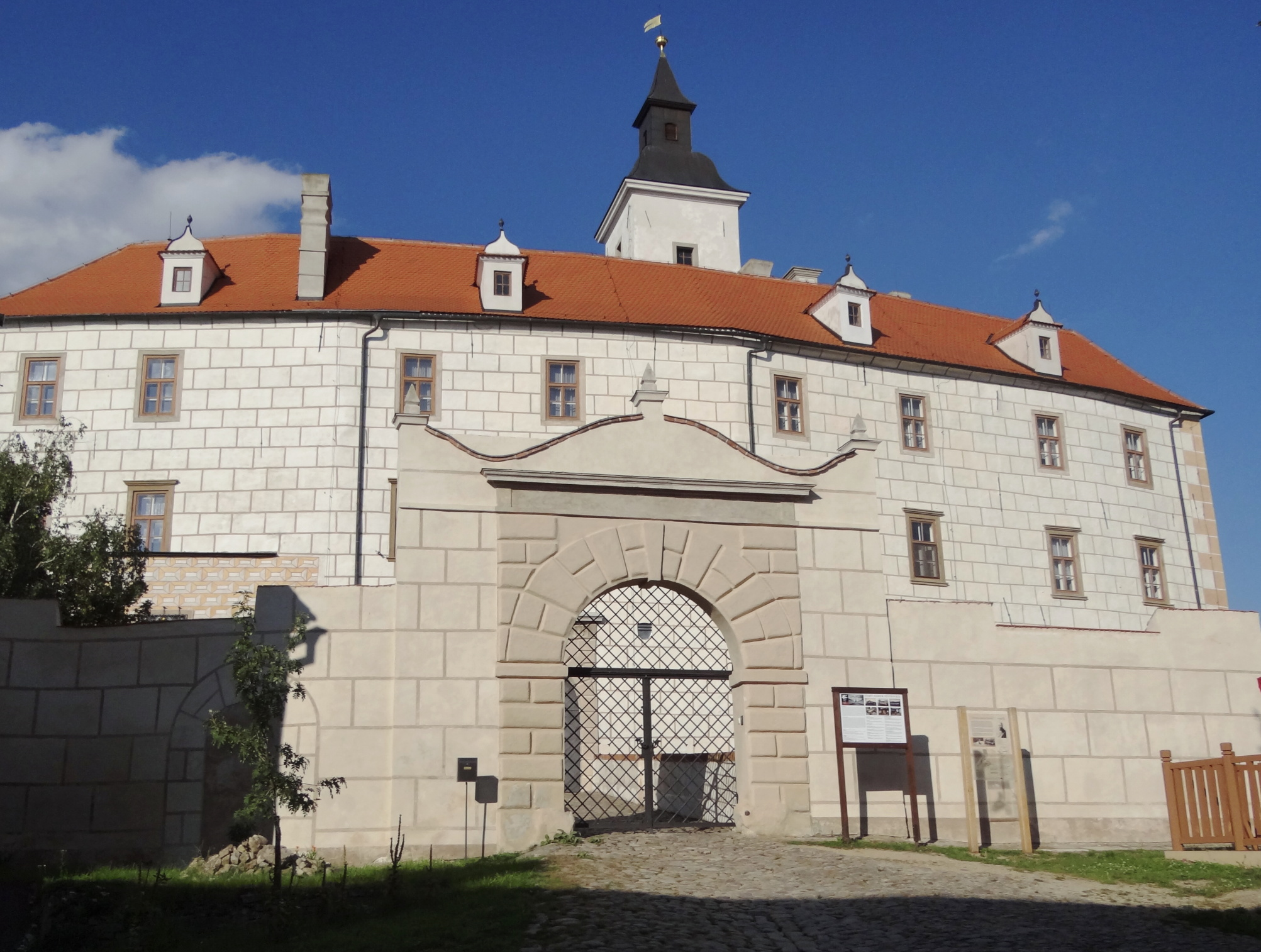 Starý zámek Jevišovice, Jevišovice 1, v obci na ostrožně, Jevišovice.